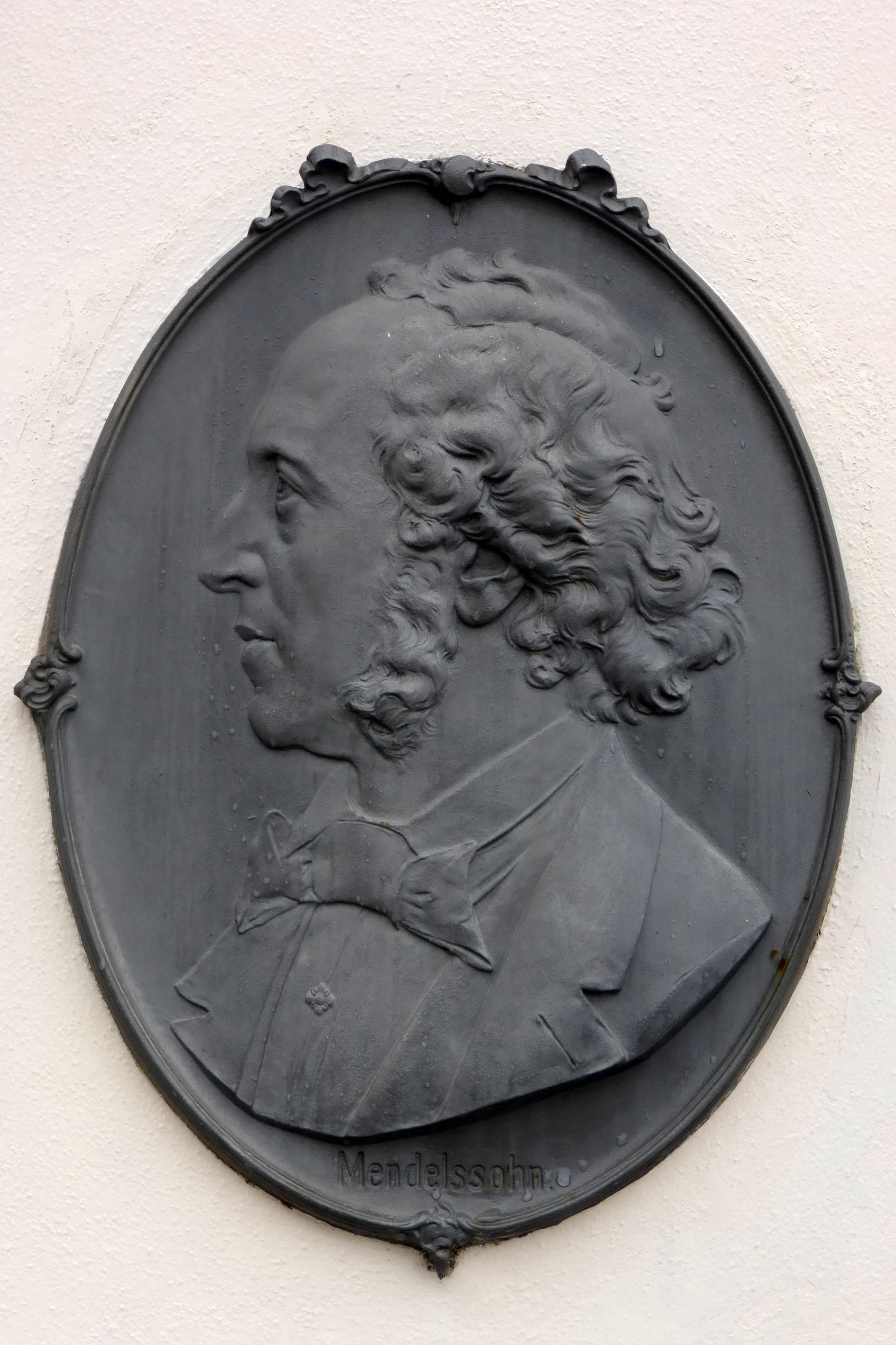 Relief von Felix Mendelssohn Bartholdy am Eingang des Grundstücks Goldschmidtstraße 12 in Leipzig.